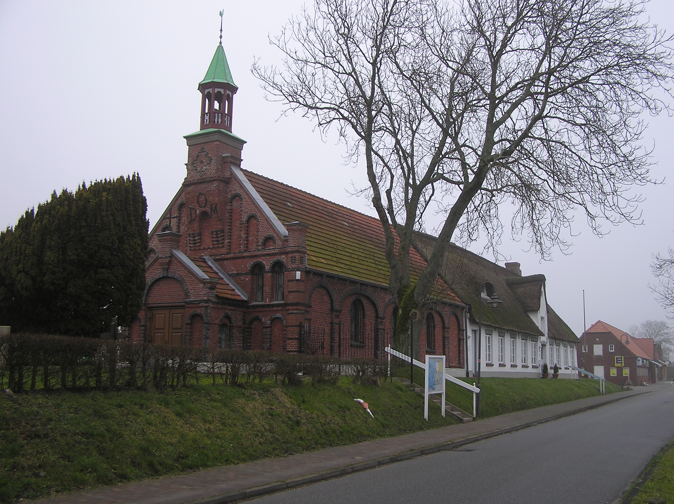 Altkatholische Kirche Osterdeich 1, Nordstrand